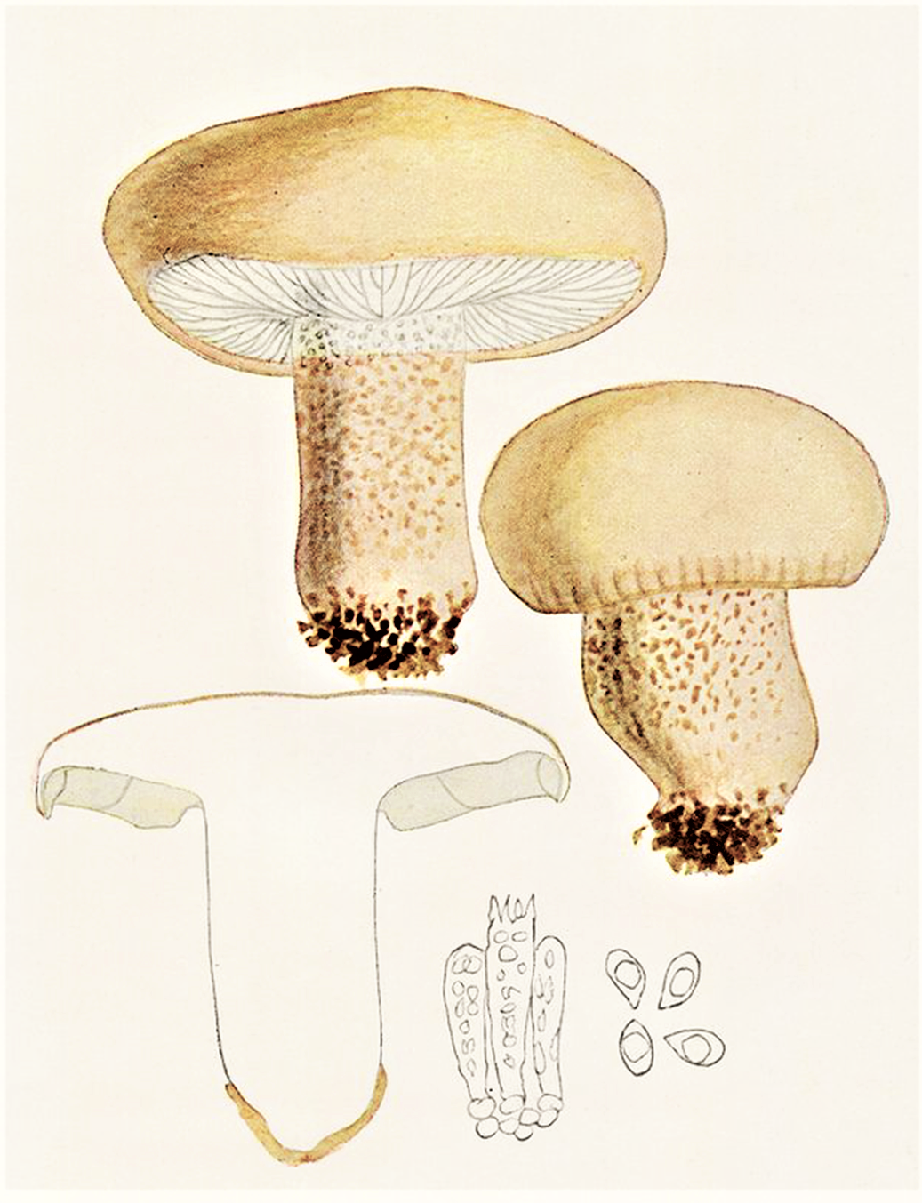 Giacomo Bresadola: Tricholoma acerbum (Bull., 1792) Quél. (1872)